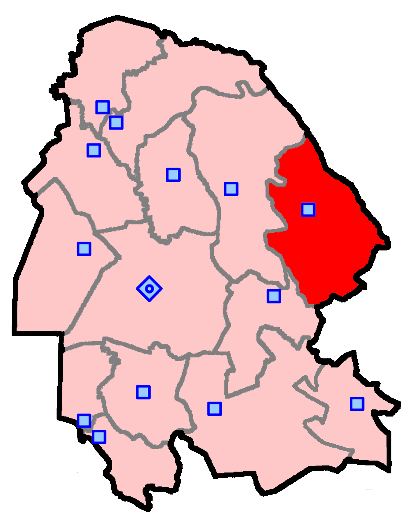 حوزهٔ انتخاباتی ایذه و باغ‌ملک برای انتخابات مجلس شورای اسلامی